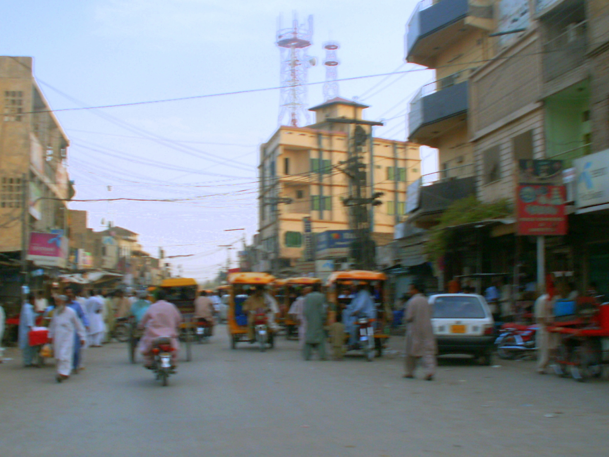 New Chowk Dadu